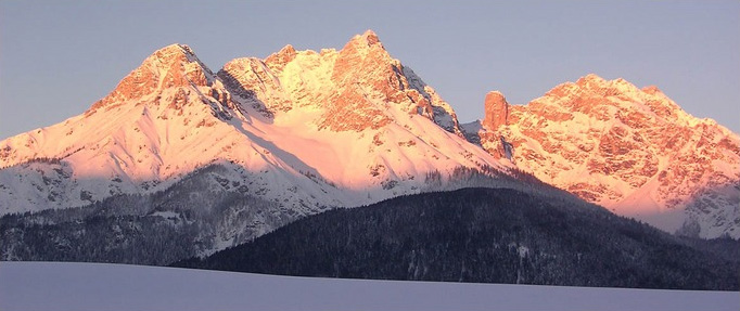 a Steinernes Meer déli irányból